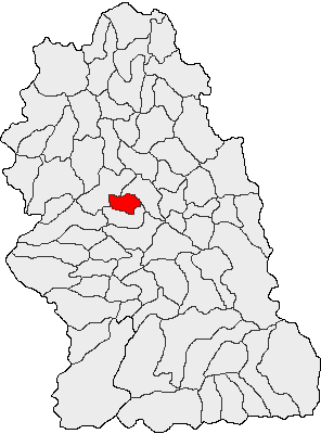 Categorie:Hărţi ale judeţului Hunedoara